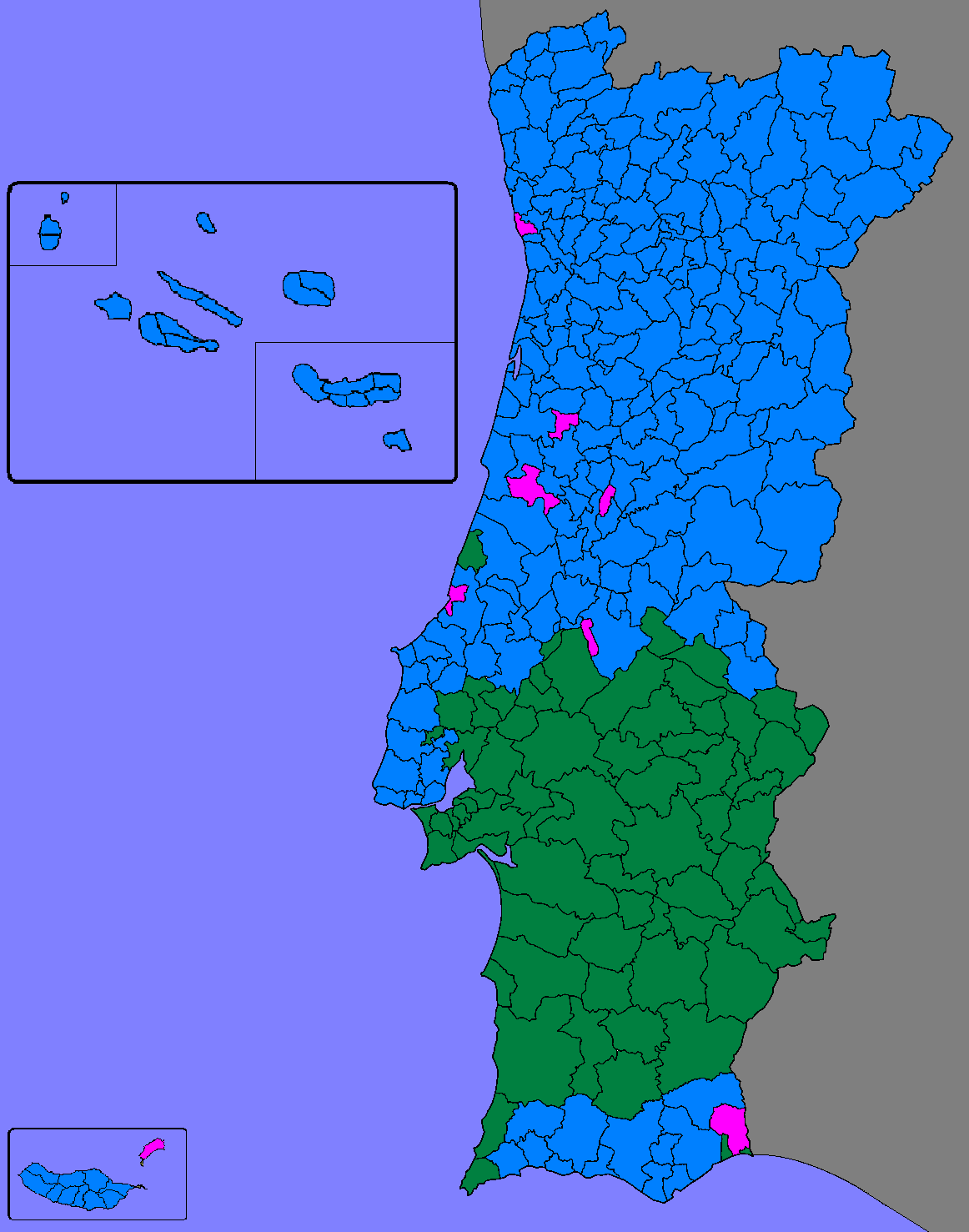 Mapa do candidato mais votado por concelho na 1.ª volta de 1986